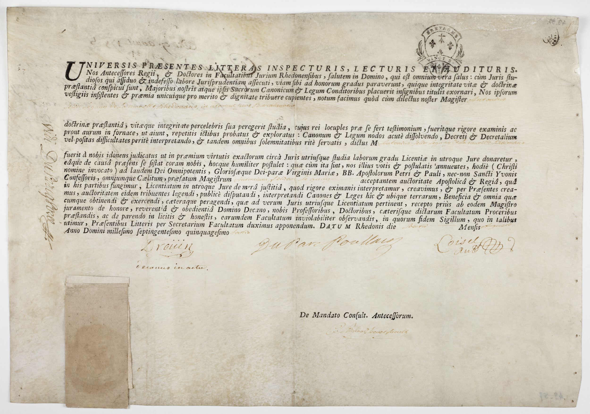 diplôme de droit délivré à Leguay de La Marette Félix par l'université de Rennes en 1753